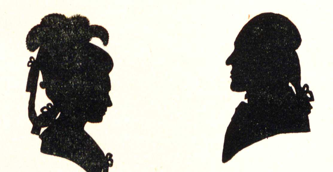 Jacob von Döhren: Elisabeth geb. Ruperti und Benjamin Gottlob Hoffmann 1785 Schramm, Seite 41